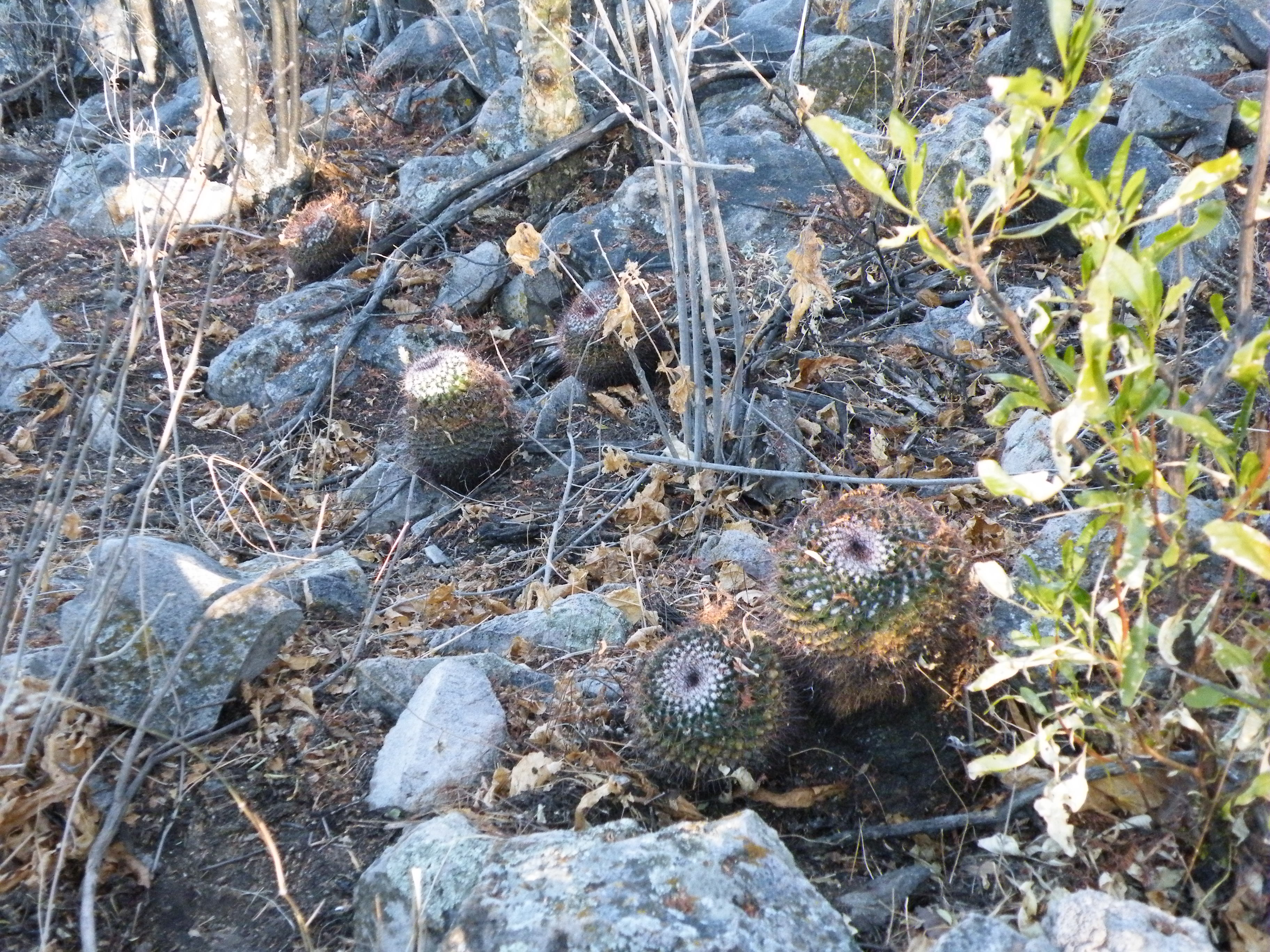 Mesa Grande, Aguascalientes